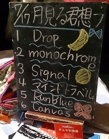 amiinaセトリボード(20150717(1))